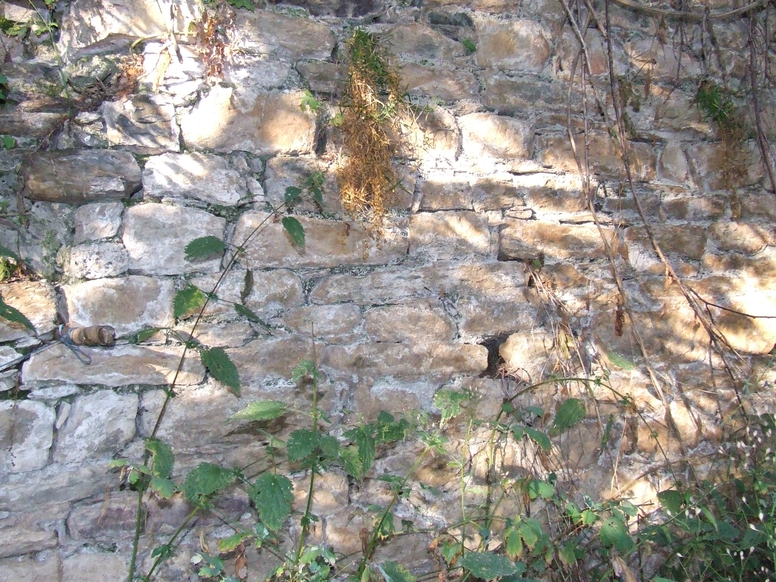 Detall del que queda de Sant Esteve de Mont-ros (la Torre de Cabdella, Pallars Jussà)